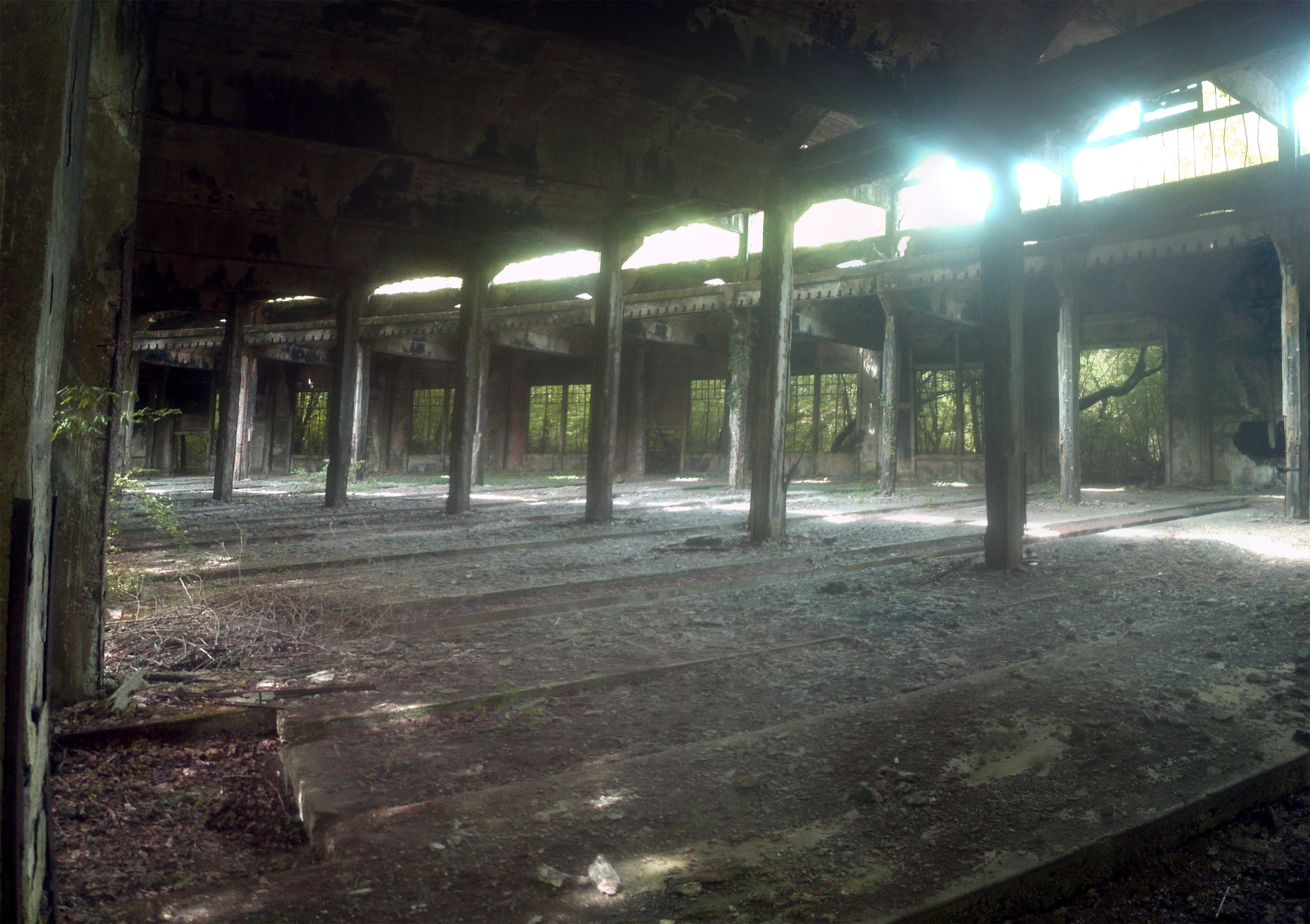 Bahndepot bei Benestroff. Grosser Lokschuppen. Heute ist das Gelände völlig renaturiert.